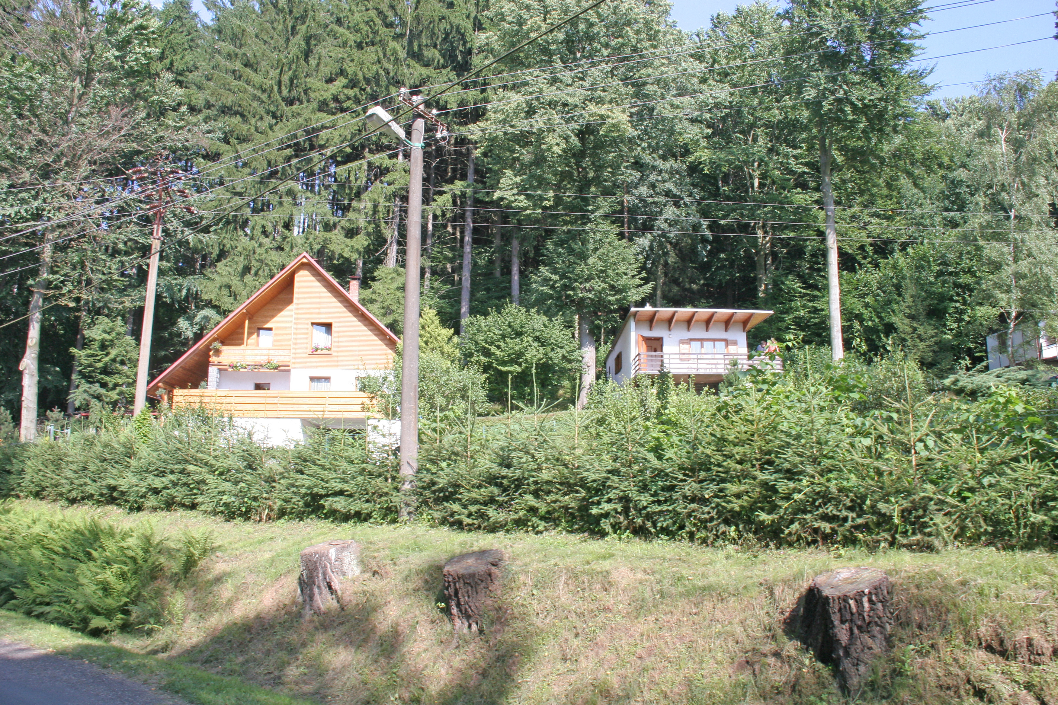 Hořelec chaty